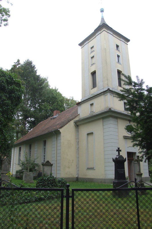 Dorfkirche in Berlin-Heiligensee Fotograf: Harald Rossa Datum: August 2006 Höher aufgelöste Version ist verfügbar